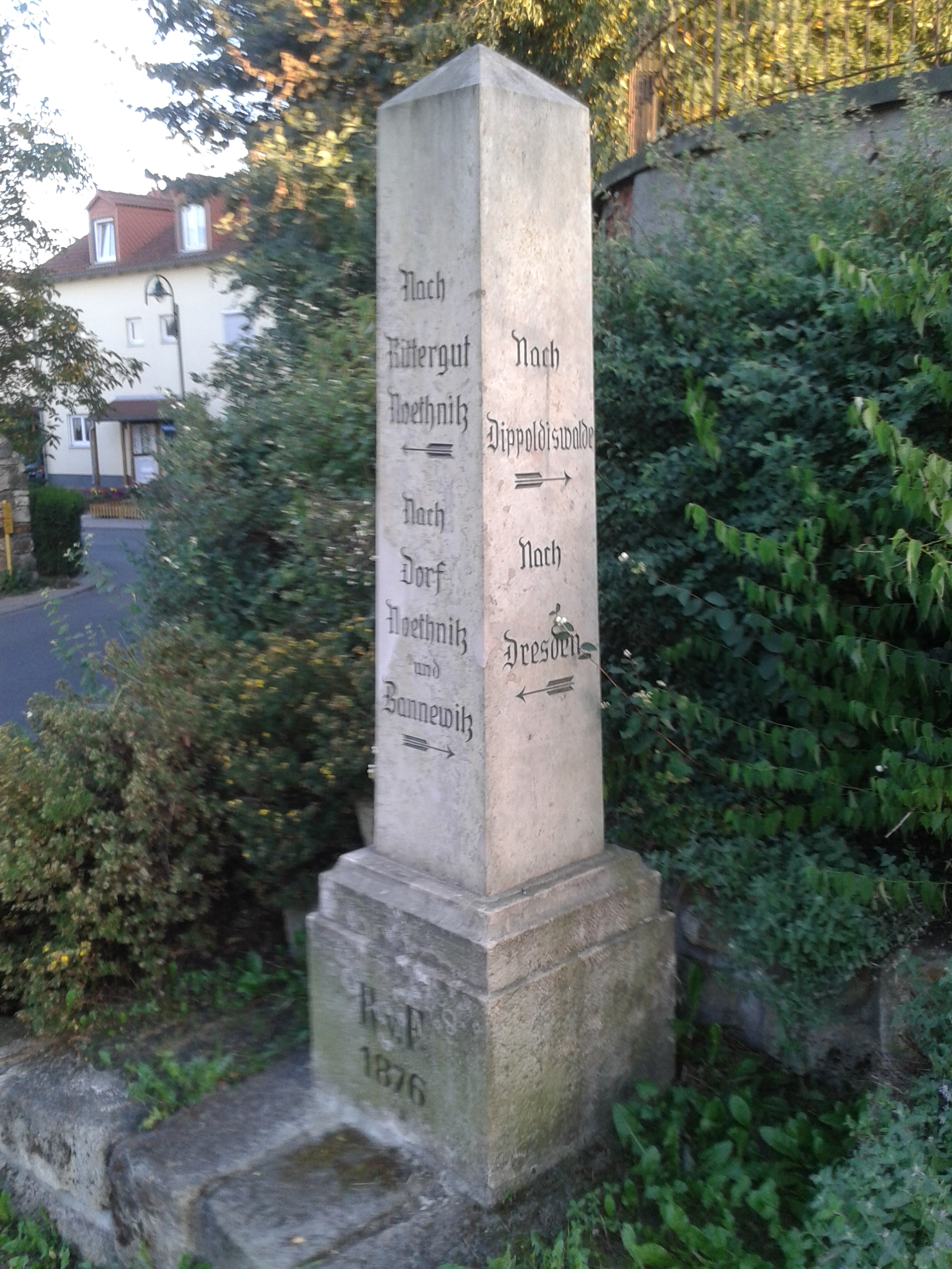 hist. Wegsäule in Nöthnitz(Bannewitz), Ecke Winckelmannstr./Rosentitzer Str.